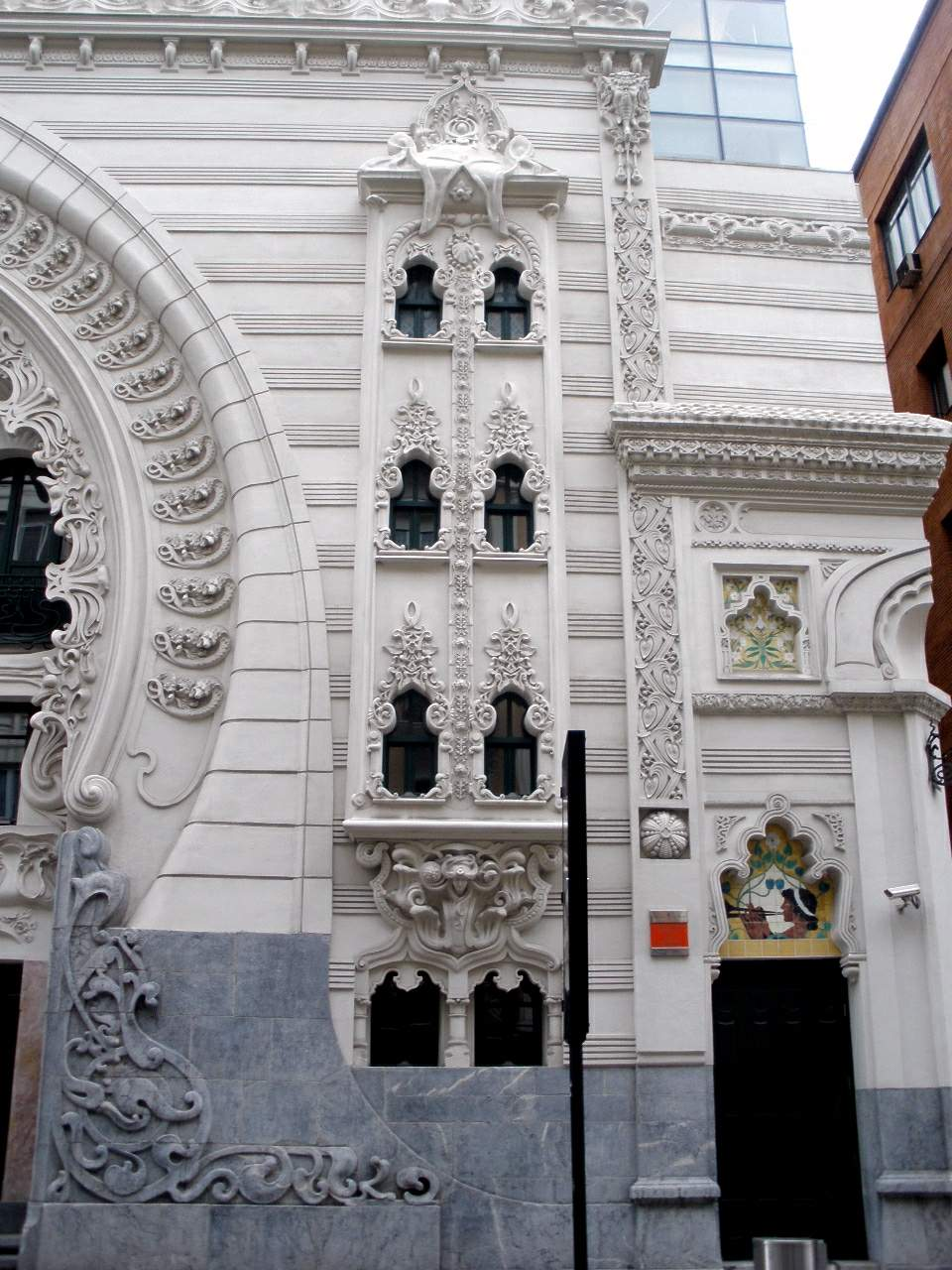 Bilbao - Teatro Campos Eliseos